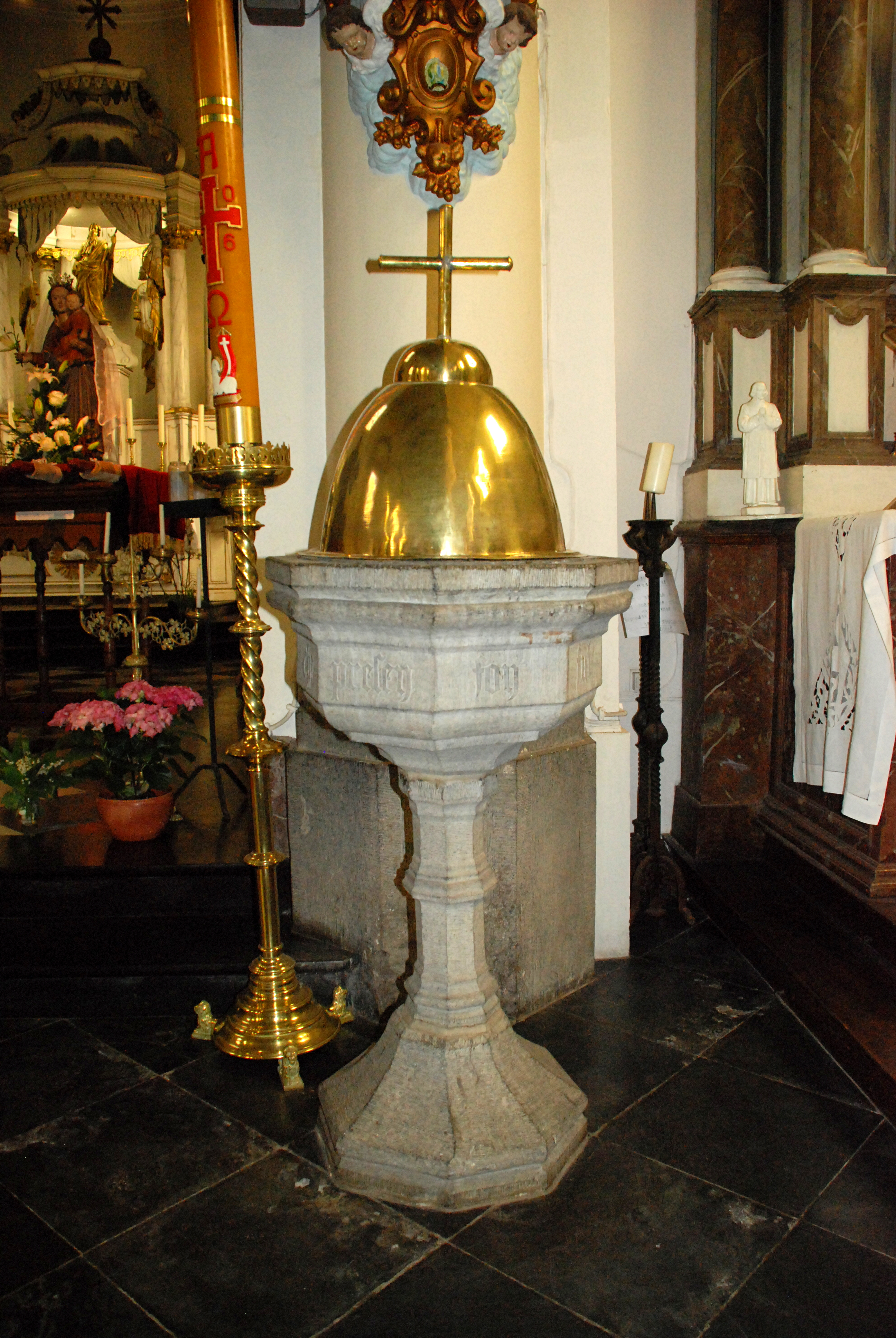 Belgique - Bousval - Église Saint-Barthélemy de Bousval